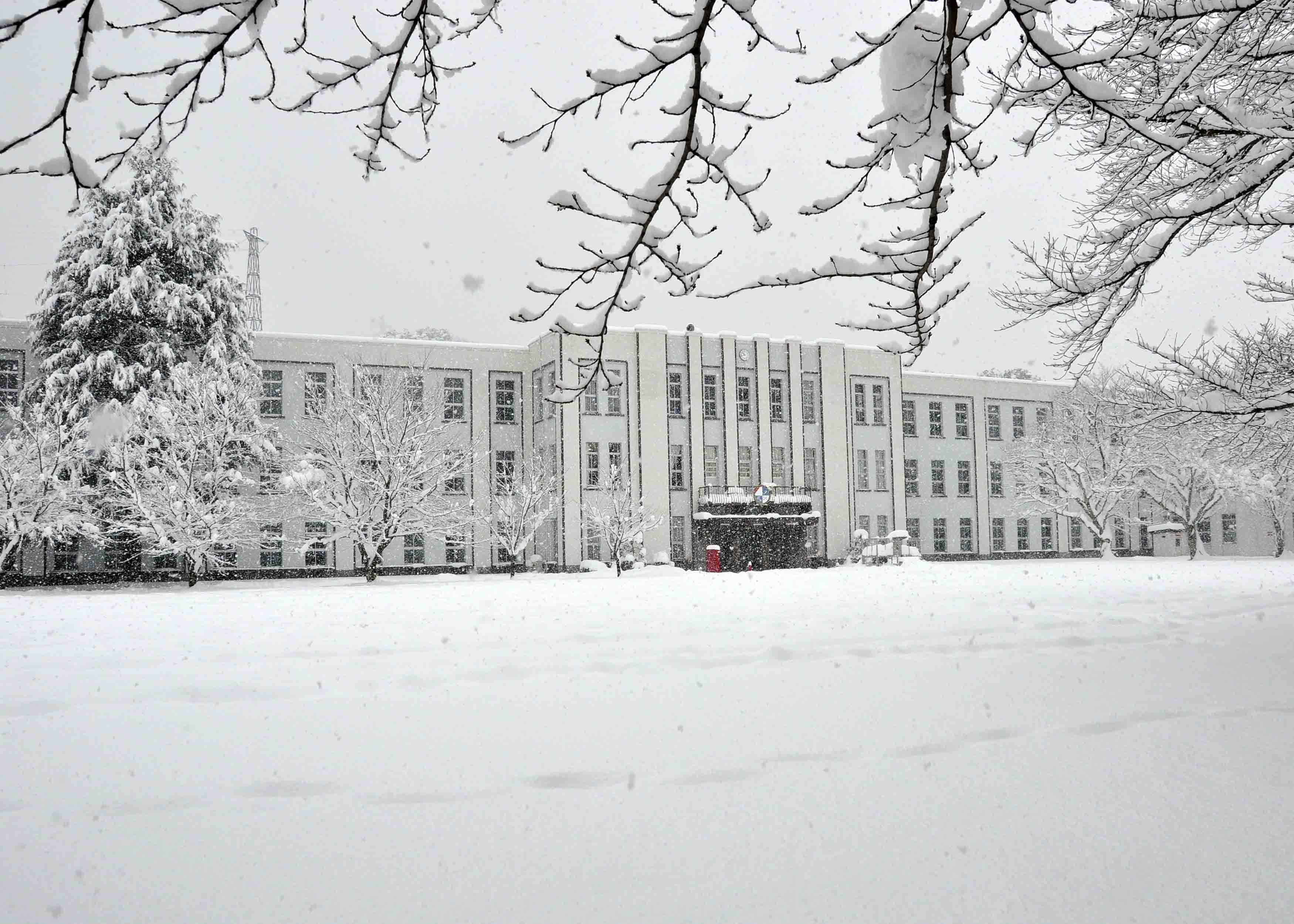 海上自衛隊第4術科学校庁舎